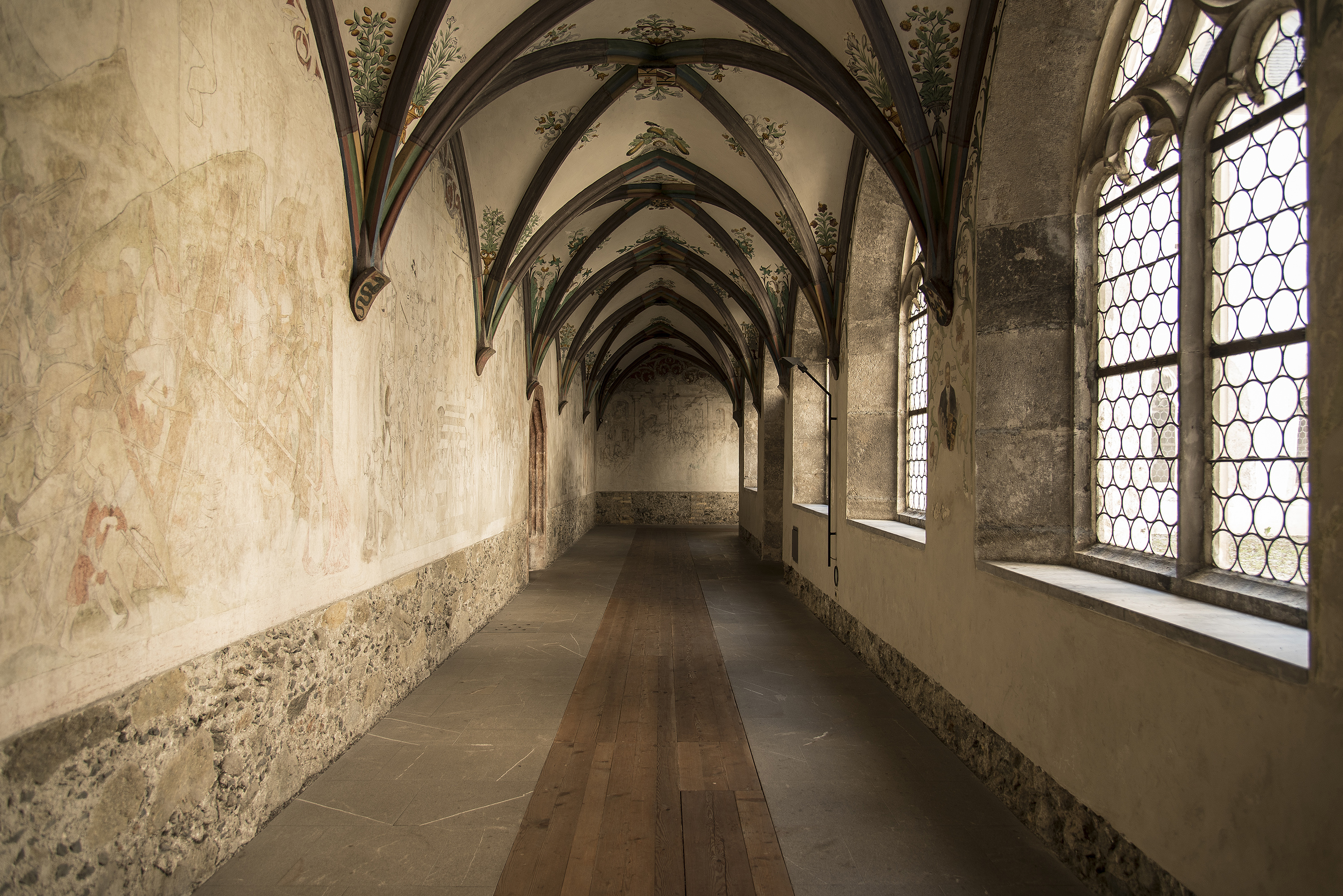 Kreuzgang im Franziskanerkloster Schwaz